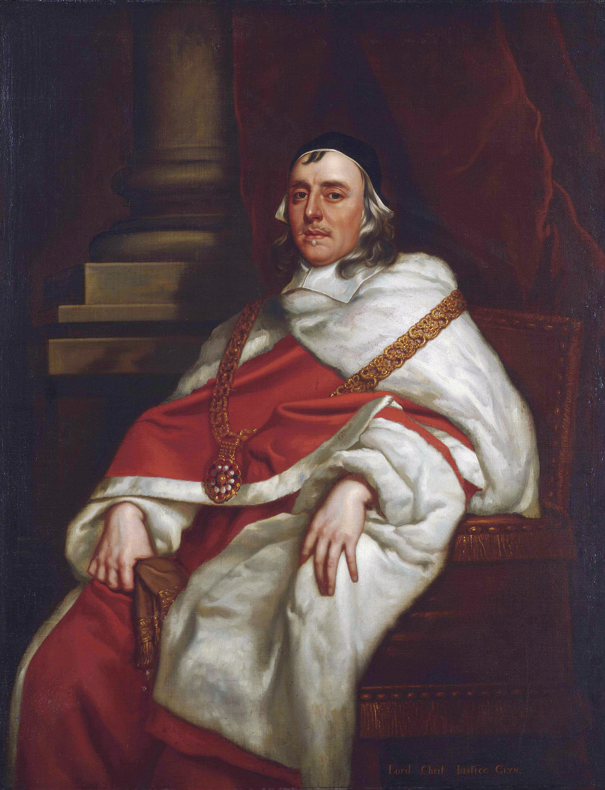 John Glynne (1602-1666)